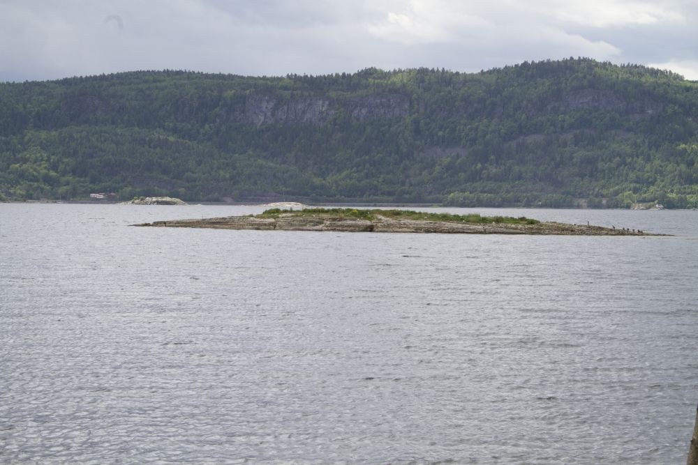 Det lille skjæret har i mange år vært en stabil hekkekoloni for hettemåke.